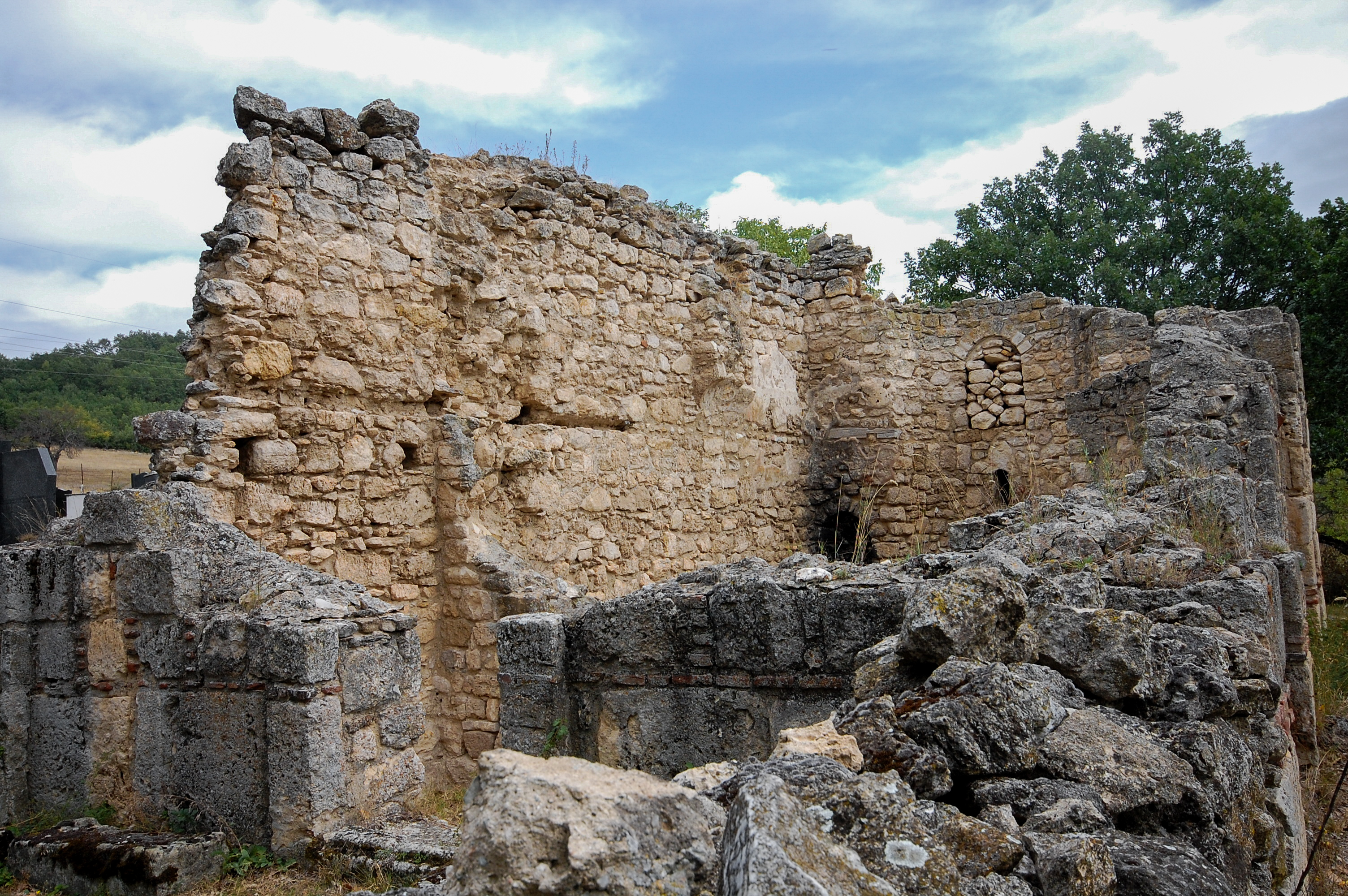 Gërmadhat e Kishës së Shën Varvarës